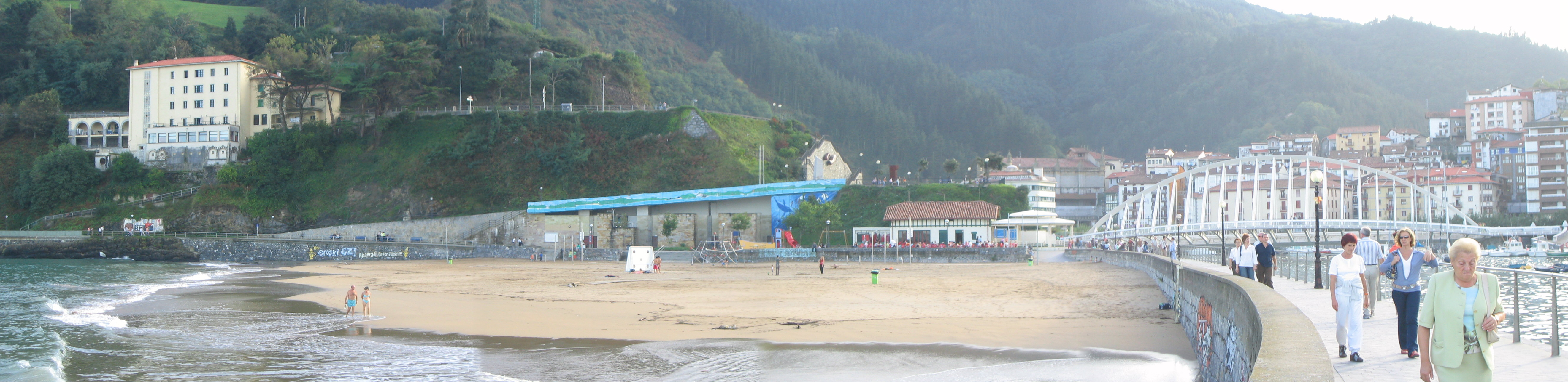 Playa de Arrigorri en Ondarroa, Vizcaya, País Vaco, España.